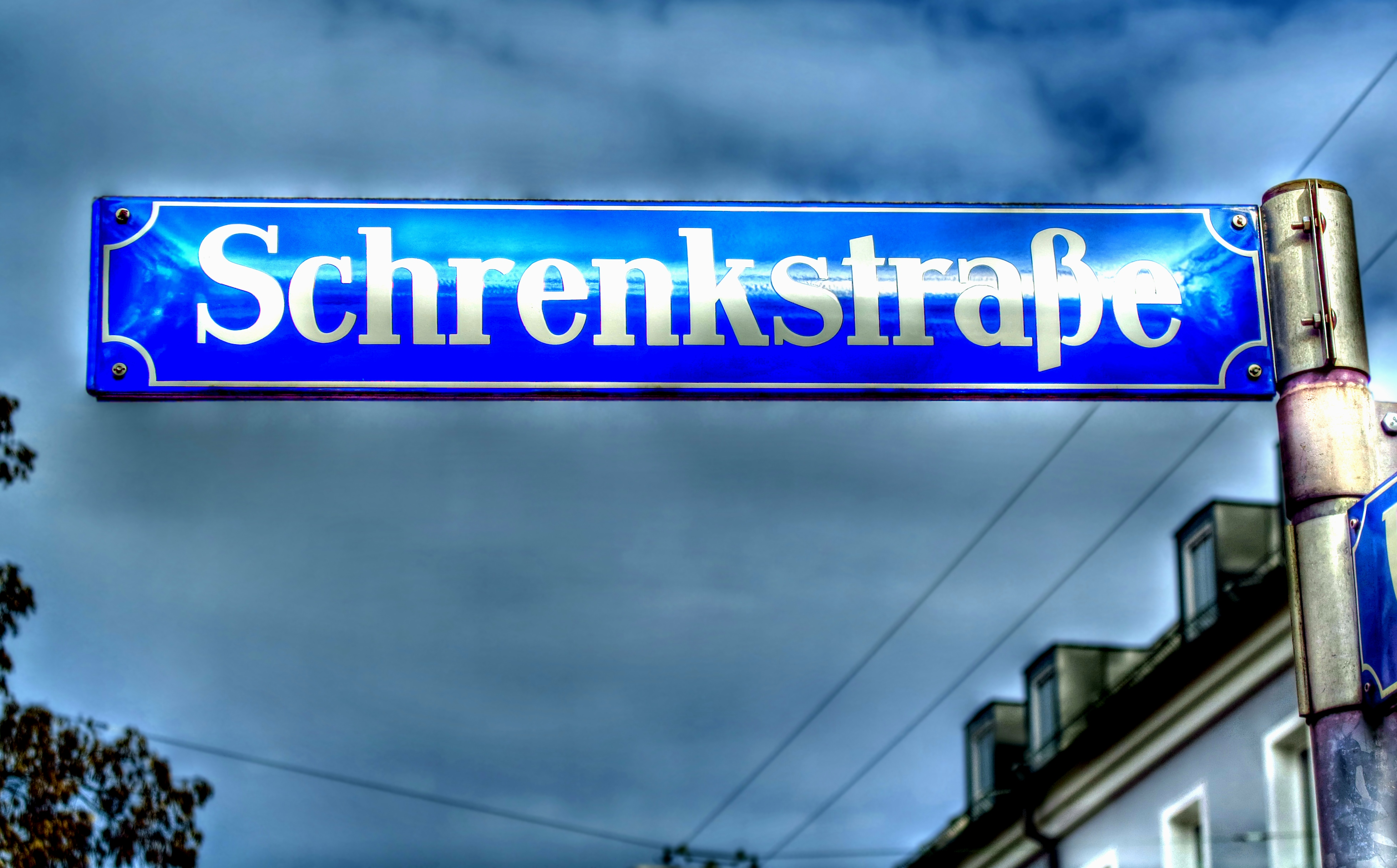 Deutschland, Bayern, München, Schrenkstraße